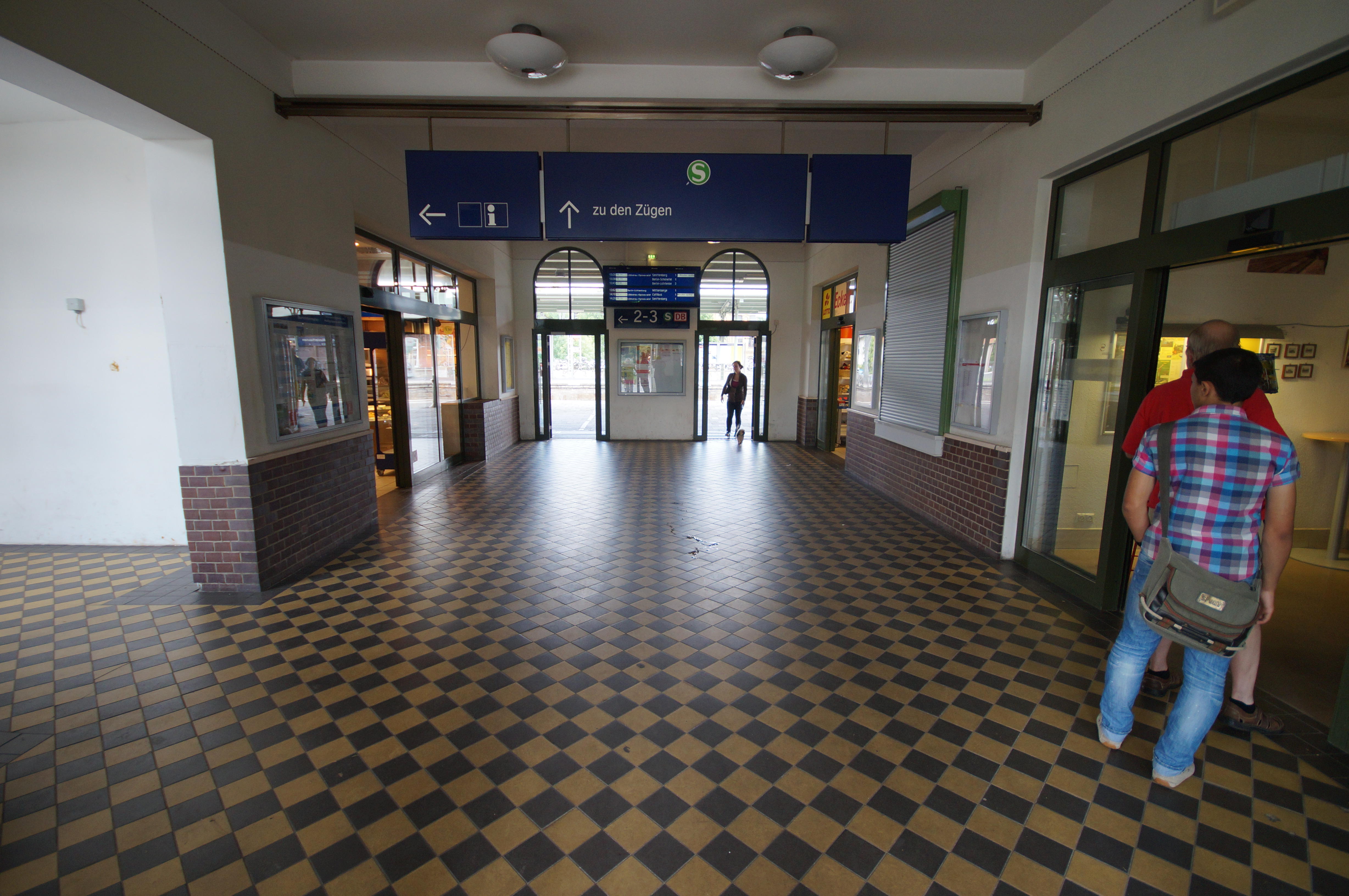 Die Bahnhofshalle des Bahnhofs Königs Wusterhausen